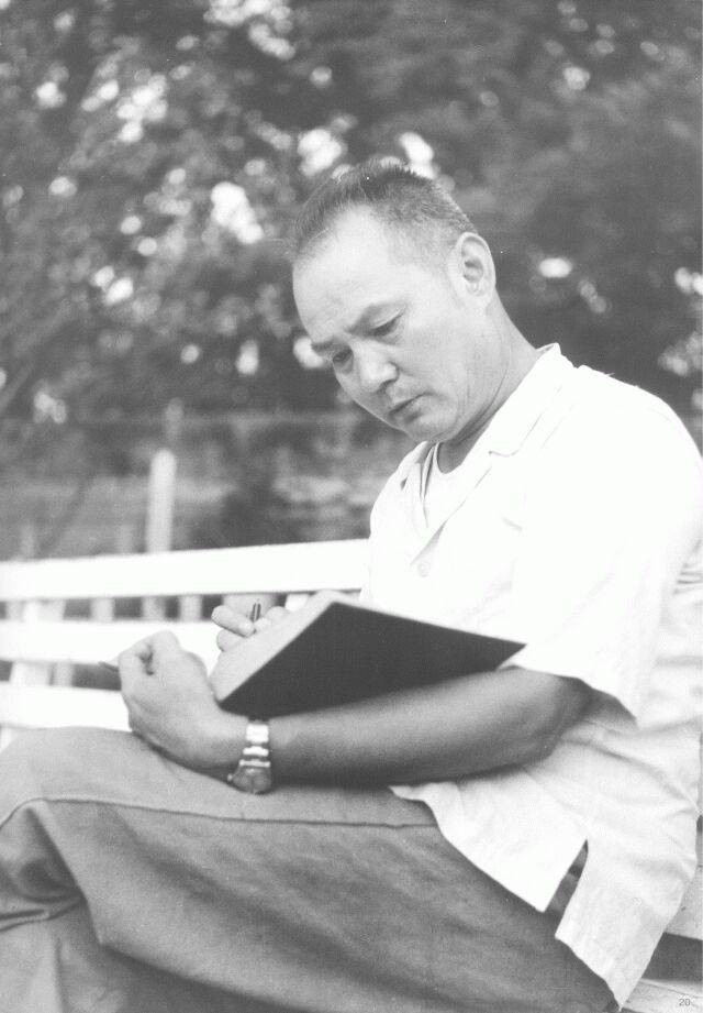 1949年，北平市市长叶剑英在中南海驻地